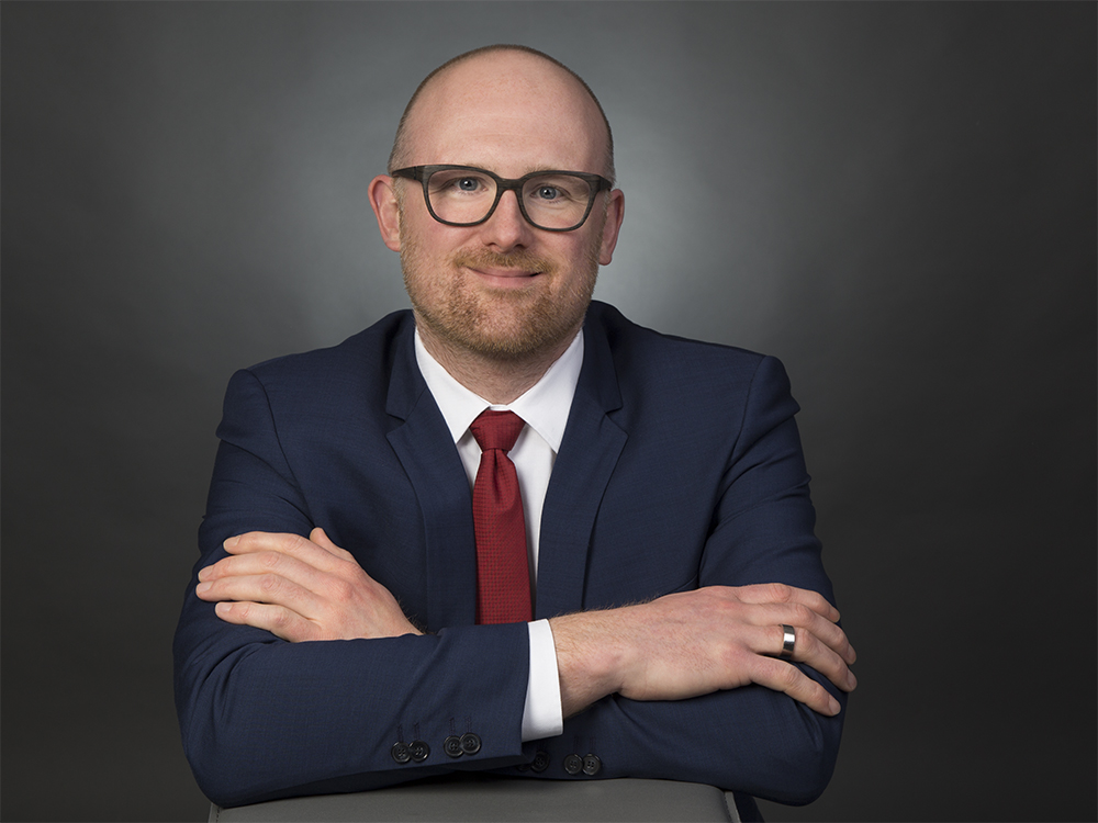 Pressefoto Sören Link, Alle Rechte vorbehalten. (C) 2016